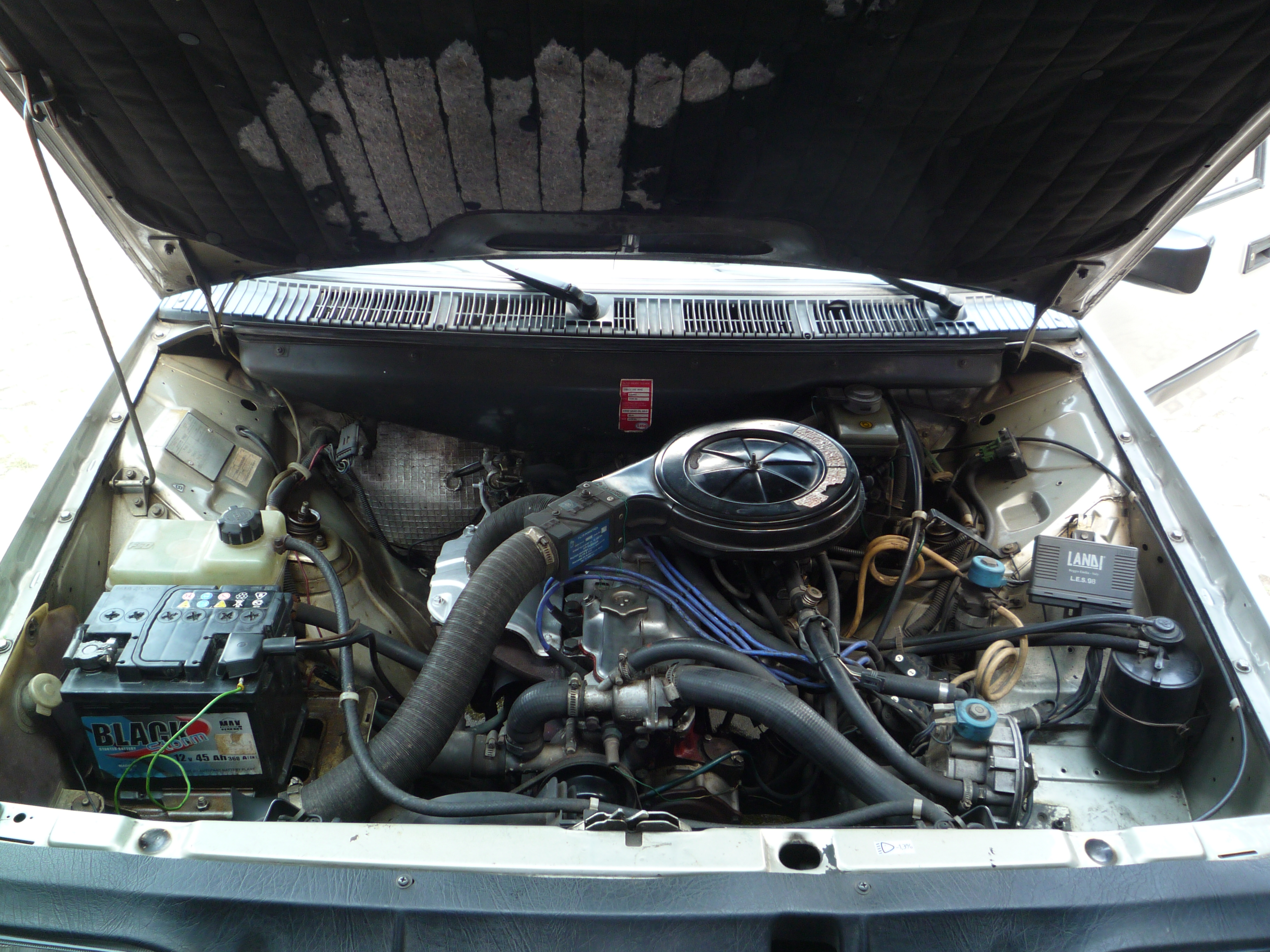 FSO Polonez Caro - silnik 1,6 GLI